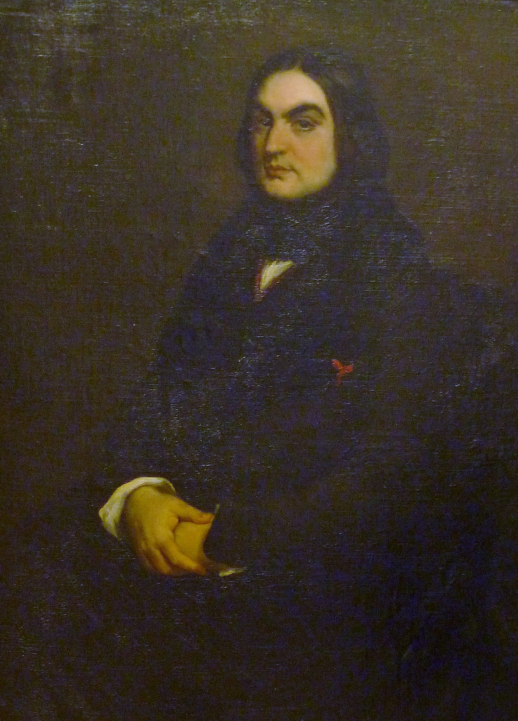 Émile Souvestre (1806-1854)